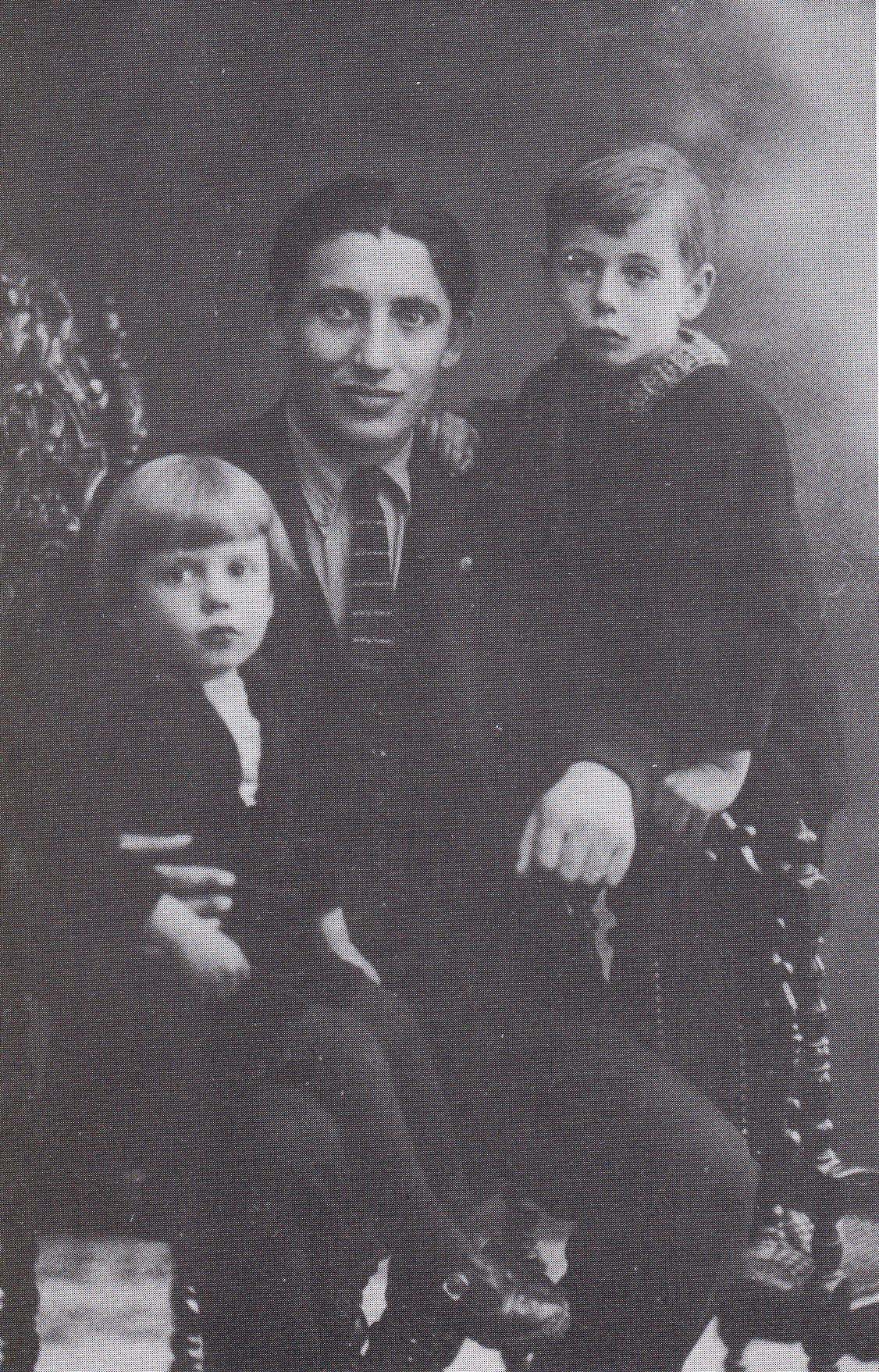 G.J.M. van het Reve, met zoons Gerard en Karel, ca. 1927